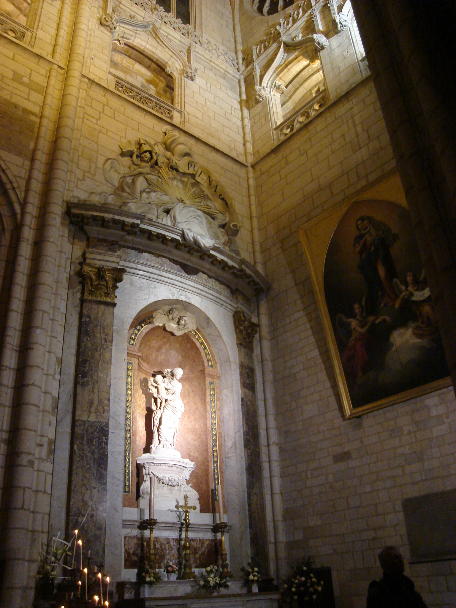 Eglise St Nizier, Lyon